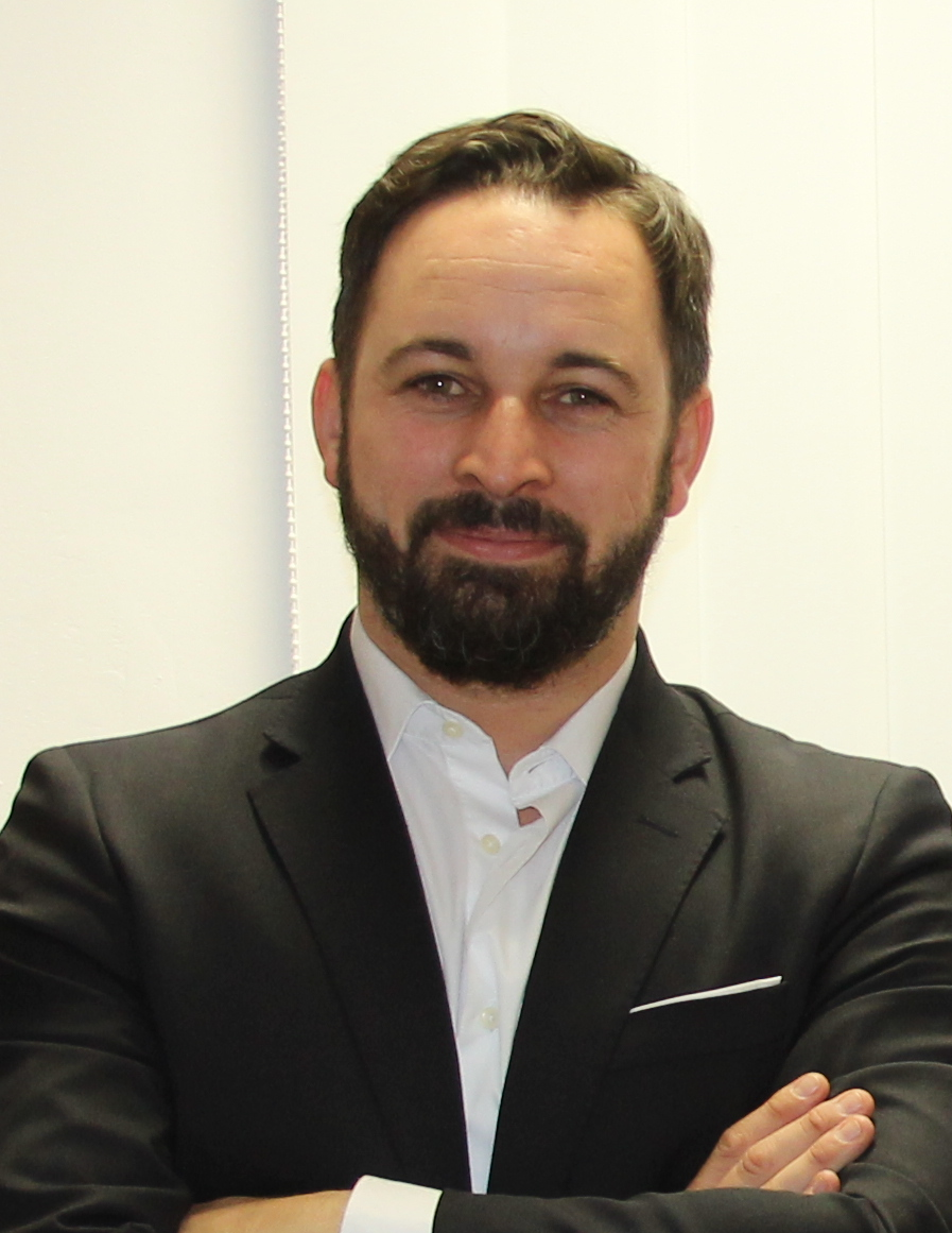 Pedraza, Abascal, Urcelay y Arsuaga (en la foto) coincidieron en que la derecha política española está "descalabrada" y sostienen que romper con la táctica del miedo es el camino de la regeneración. La Tertulia HO dedicada a 'La crisis de la derecha en España' estuvo protagonizada por el presidente de Vox, Santiago Abascal; la presidenta de la AVT, Ángeles Pedraza; el fundador y ex presidente de Profesionales por la Ética, Jaime Urcelay, y el presidente de , Ignacio Arsuaga.